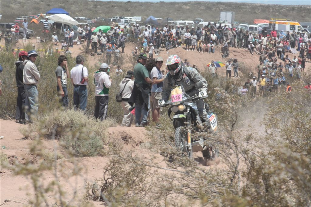 Rally Dakar 2009, etapa 4 Jacobacci Neuquén. ORFANOS (Grecia), moto HONDA